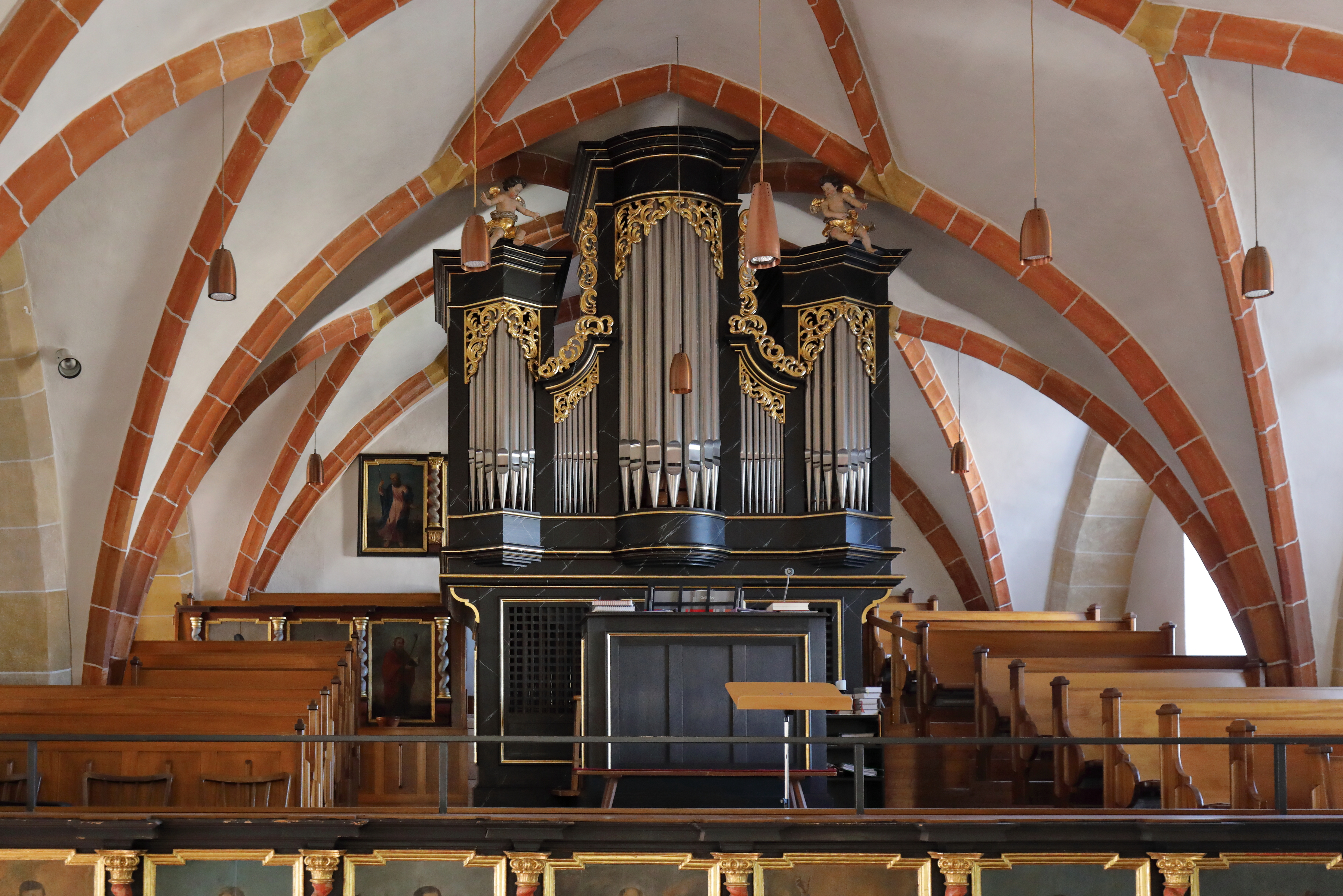 Orgel der röm.-kath. Pfarrkirche hl. Michael in der oberösterreichischen Marktgemeinde Eberschwang.Die Orgel wurde unter Verwendung des Rokoko-Orgelgehäuse aus dem Jahr 1794 von Orgelbau Pirchner gefertigt und am 29. September 1978 geweiht. Sie besitzt mechanische Schleifladen, hat zwei Manuale und Pedal sowie 19 Register.